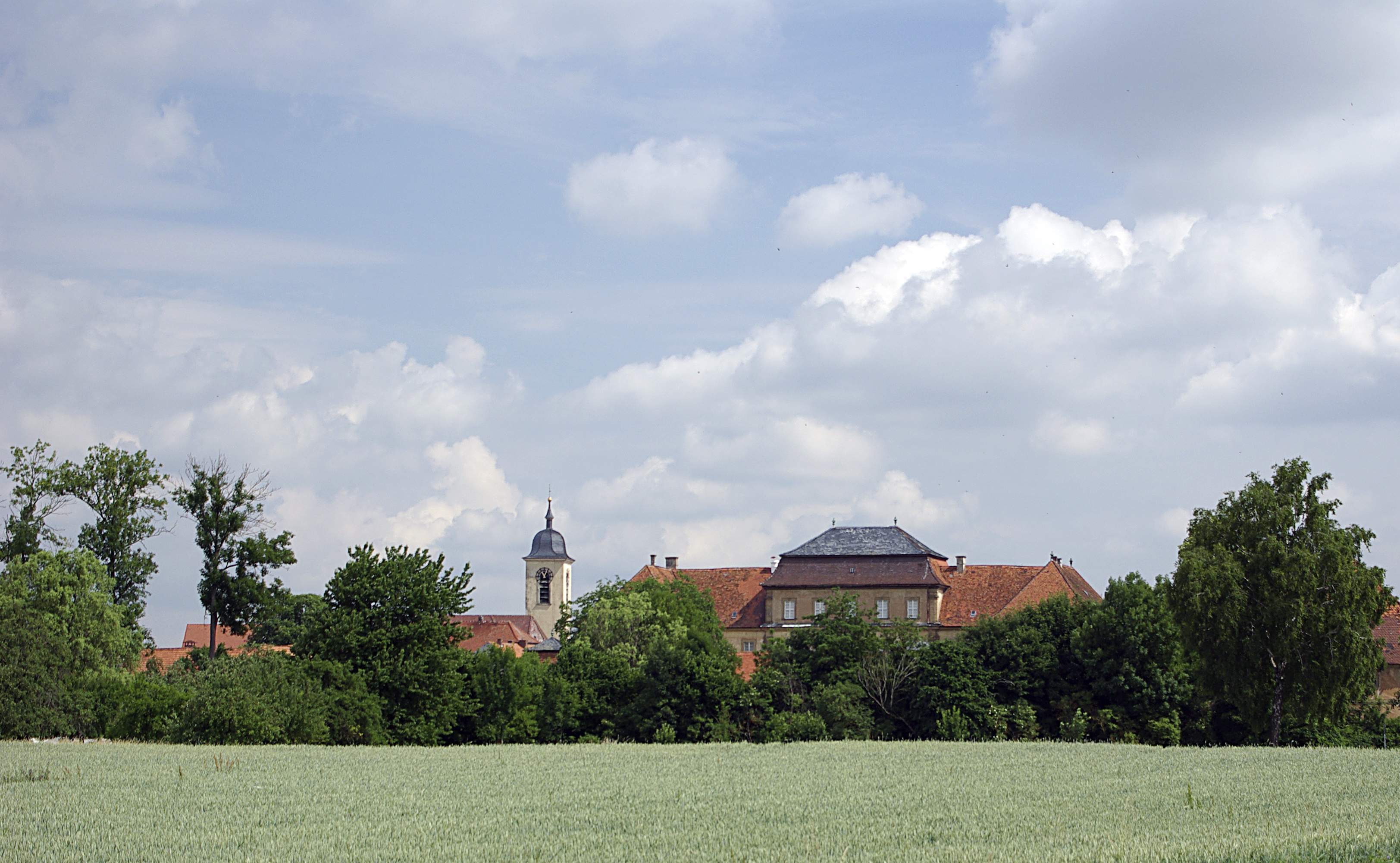 Ansicht von Sulzheim aus Richtung Alitzheim